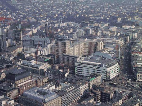 Foto vom Maintower auf das Palais Thurn und Taxis und die Zeil, 2003